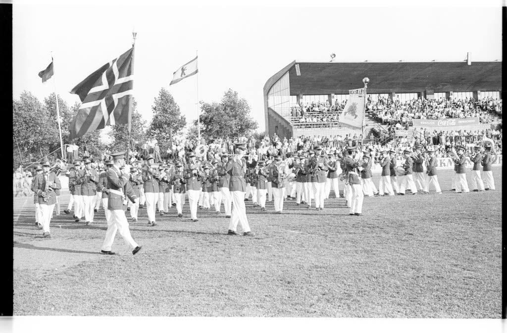 im Holsteinstadion.